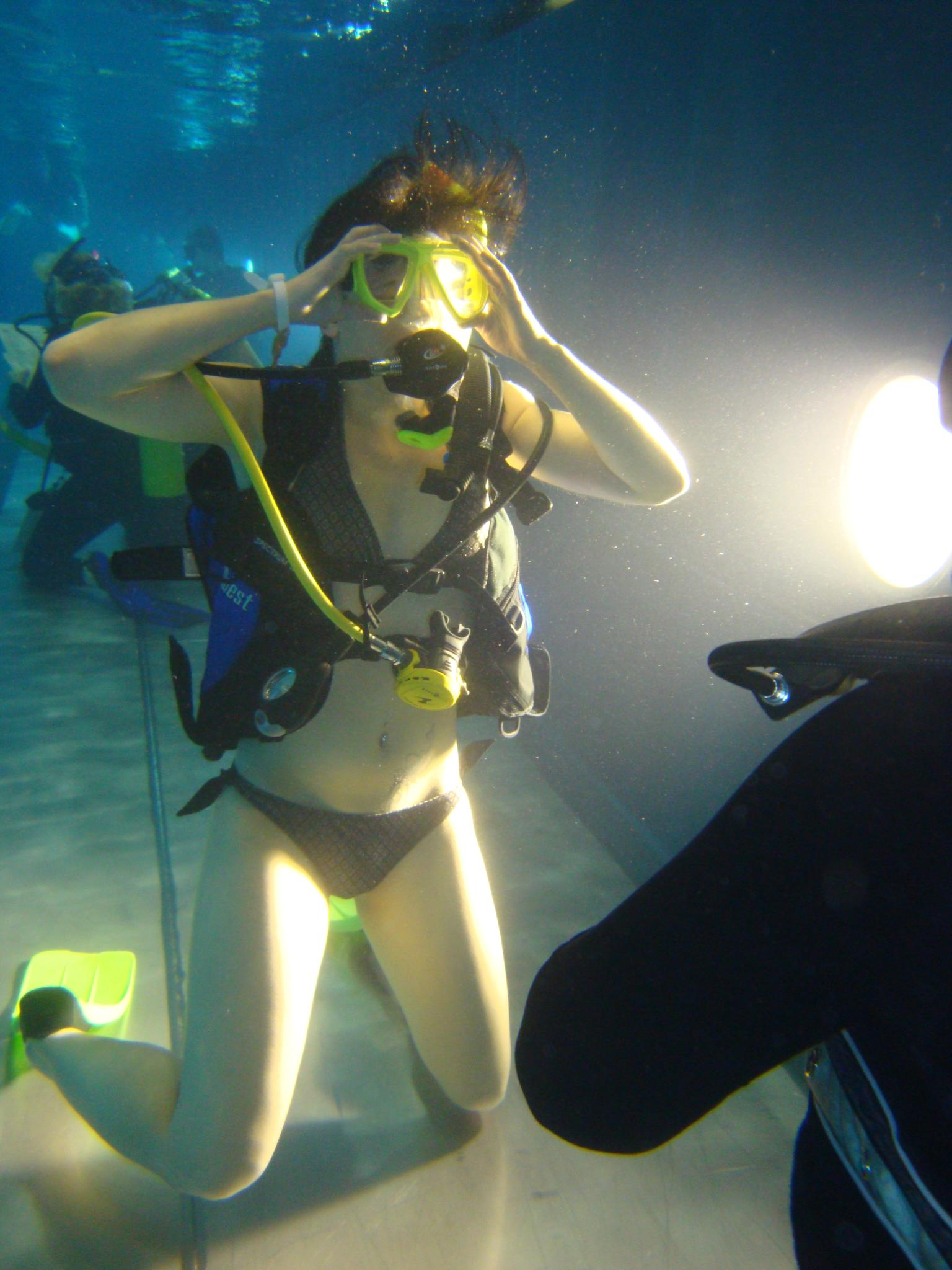 Frau beim Tauchen.